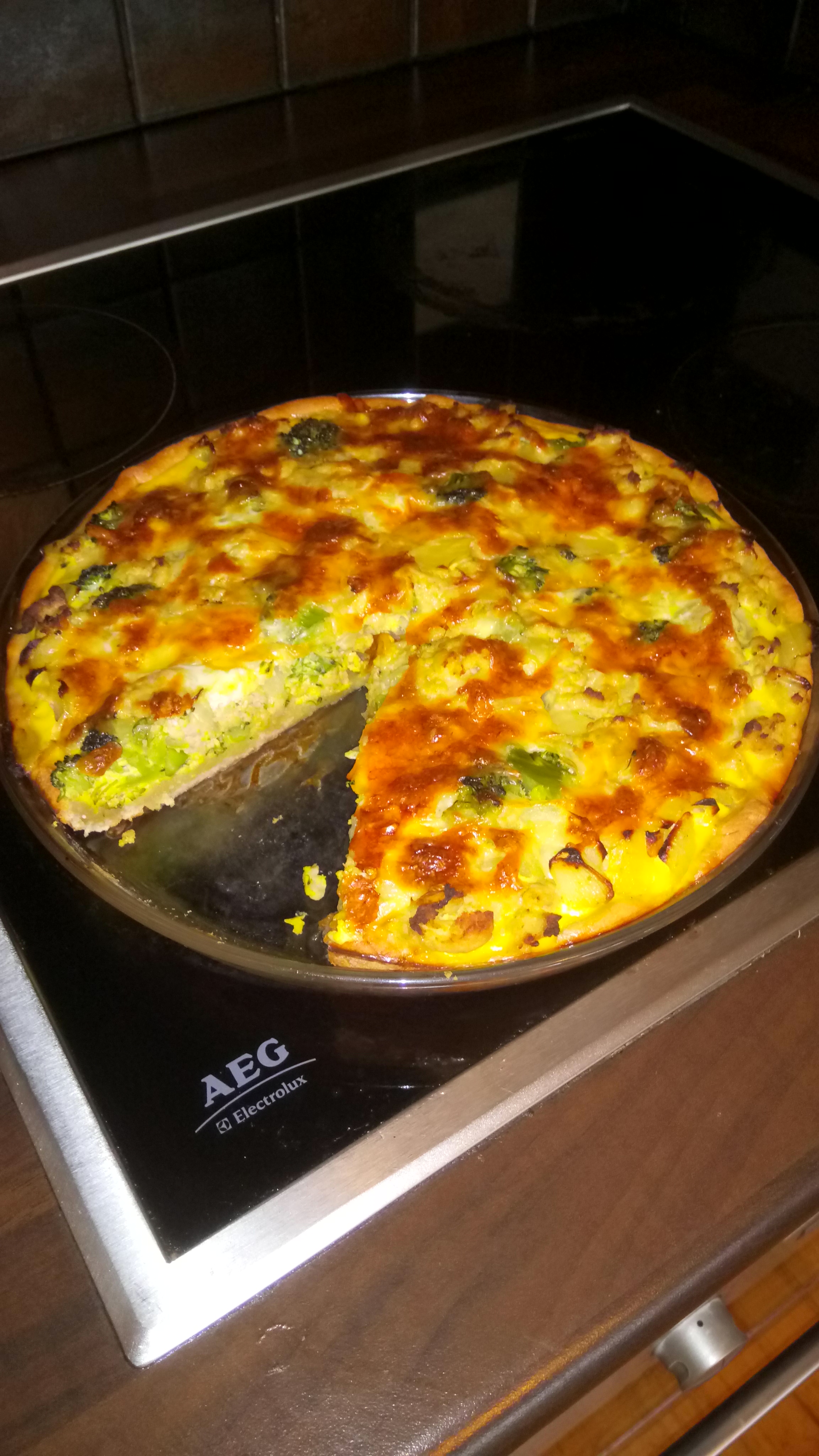 En klassisk pai, i dette tilfellet en kylling- og brokkolipai